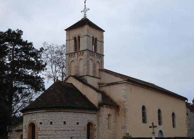 Eglise de Flagy